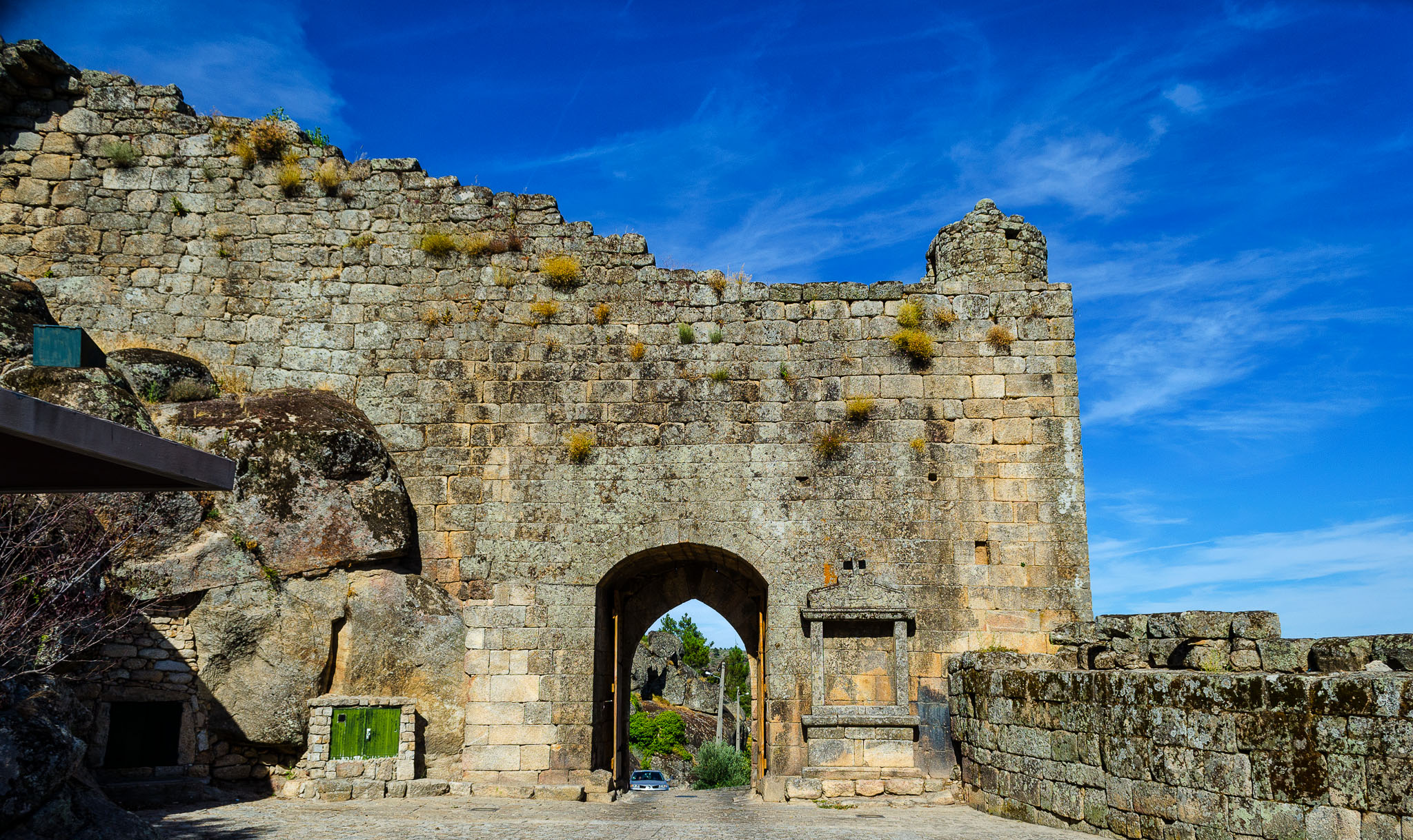 Sortelha_Porta_da_Vila